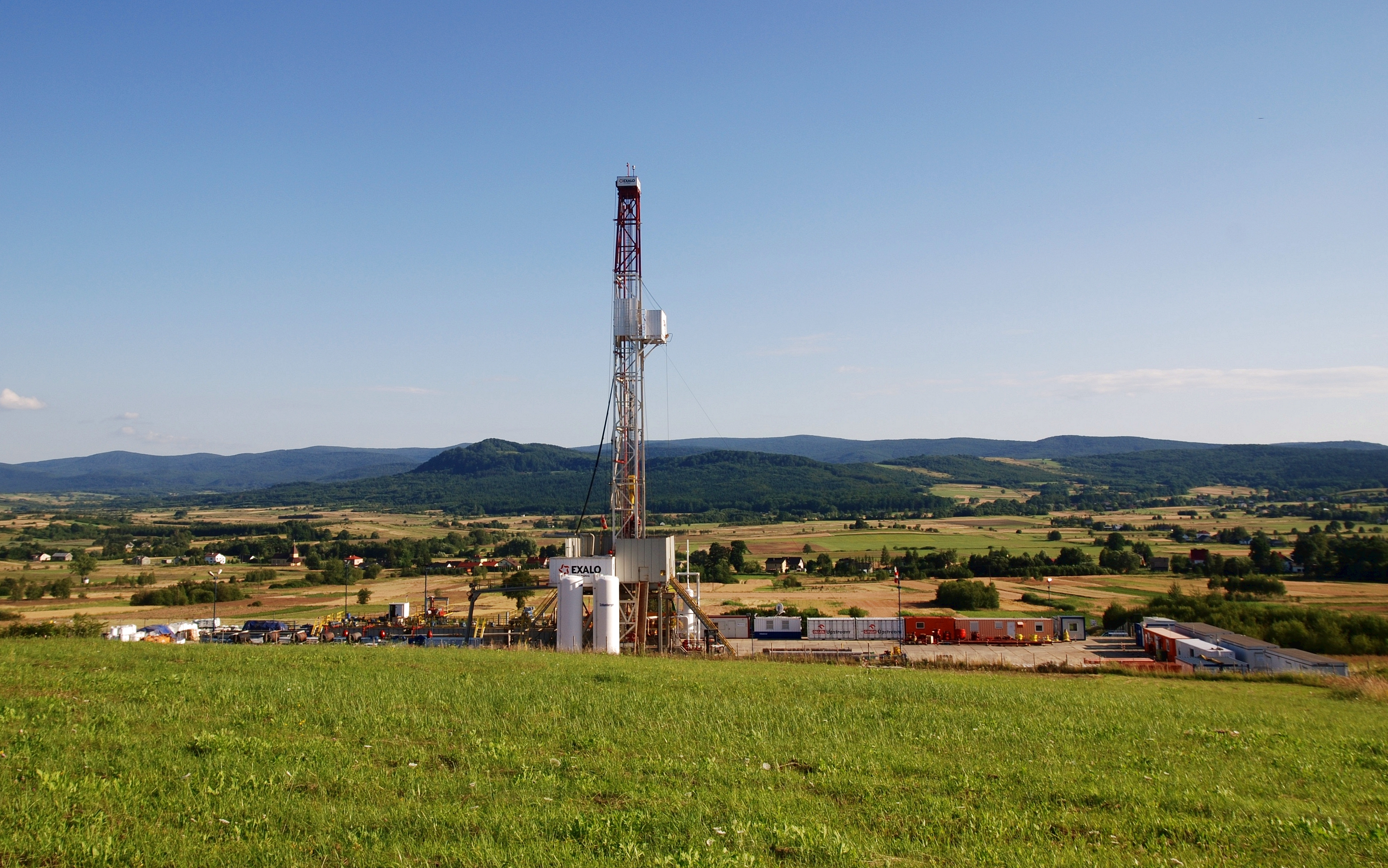 wieś Osobnica